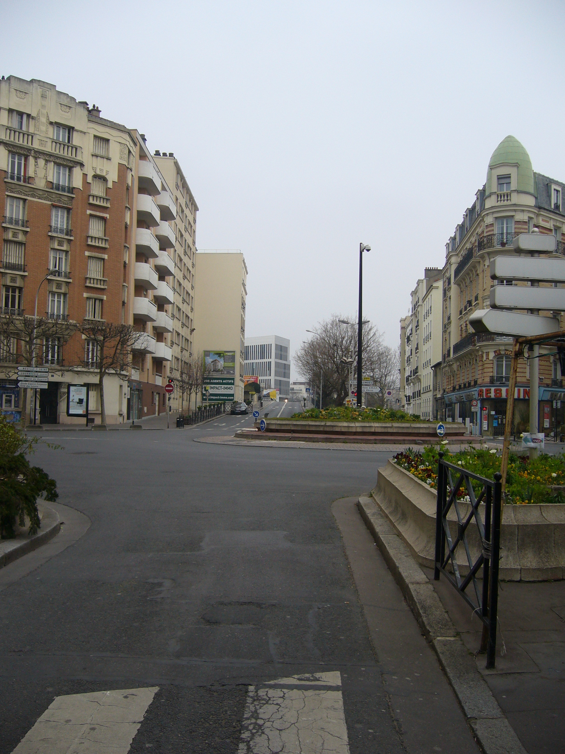 Place de Belgique, Courbevoie, France